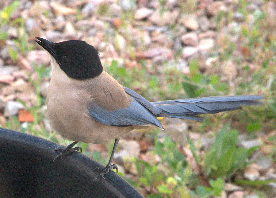 de la fenêtre de notre cuisine / da janela da nossa cozinha...